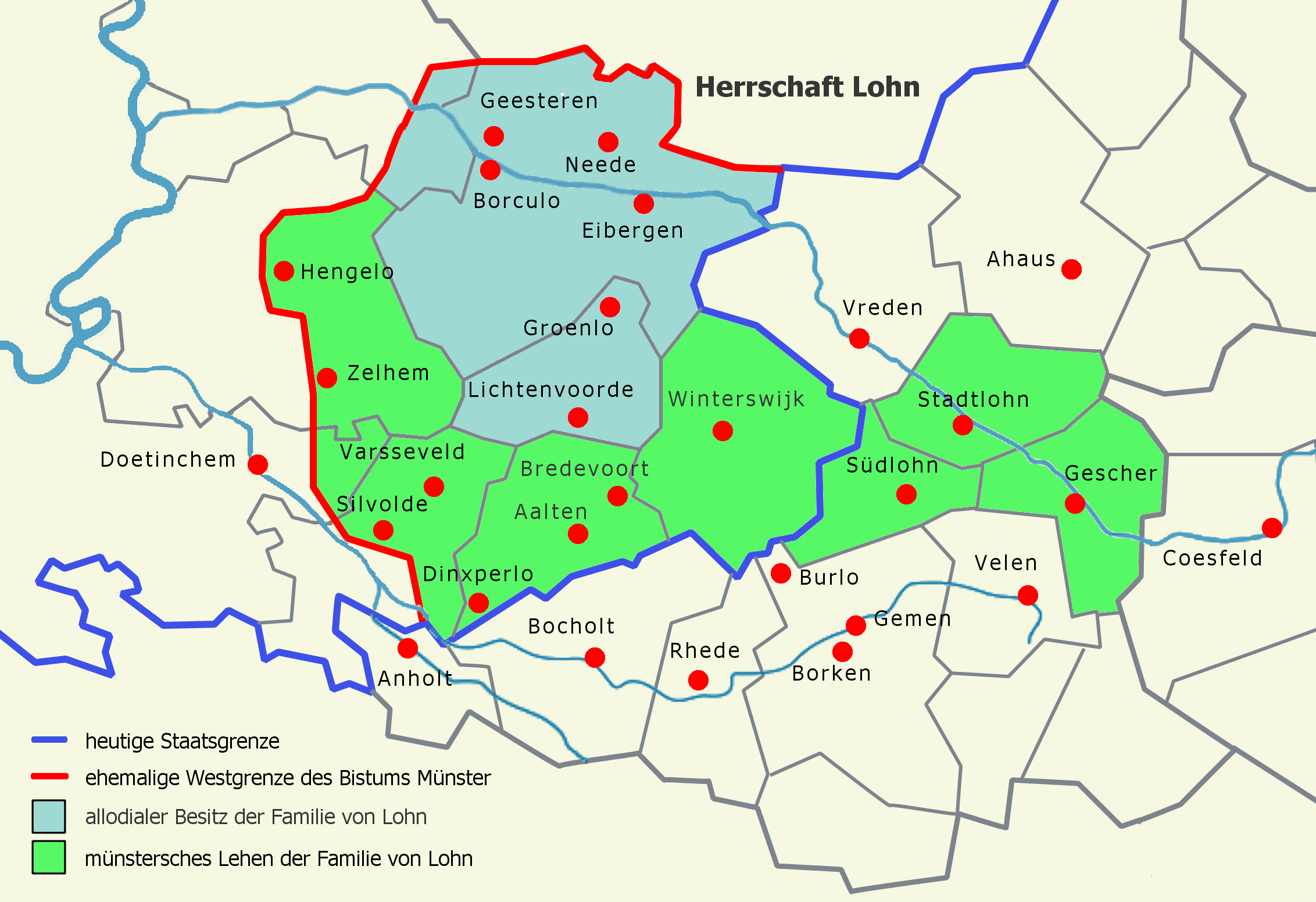 Karte mit der ungefähren Ausdehnung der historischen Herrschaft Lohn im Bereich des heutigen Westmünsterlandes und Achterhoeks um das Jahr 1250. Hier besaßen die Grafen von Lohn die vier Pfarreien Eibergen, Neede, Groenlo und Geesteren als Allodialbesitz. Vermutlich waren auch die Burg Borculo mit Teilen des Kirchspiels Geesteren, später Zentrum der Herrschaft Borculo, und die Herrlichkeit Lichtenvoorde Teil der Herrschaft Lohn. In den sechs Pfarreien Winterswijk (mit den Filialen Bredevoort, Aalten und Dinxperlo), Stadtlohn, Südlohn, Varsseveld (mit Silvolde), Zelhem und Hengelo (letztere beide bilden das sog. Land auf dem Goy) dagegen waren sie mit den Grafschaftsrechten lediglich durch den Bischof von Münster belehnt. Gleiches wird für das von Nordlohn abgepfarrte Gescher gegolten haben. Die Darstellung der Westgrenze der Diözese Münster basiert auf der Darstellung auf der letzten Seite von Germania Sacra NF 37.2. Die Südgrenze der Herrschaft folgt in seinen westlichen Teilen etwa der heutigen Staatsgrenze.